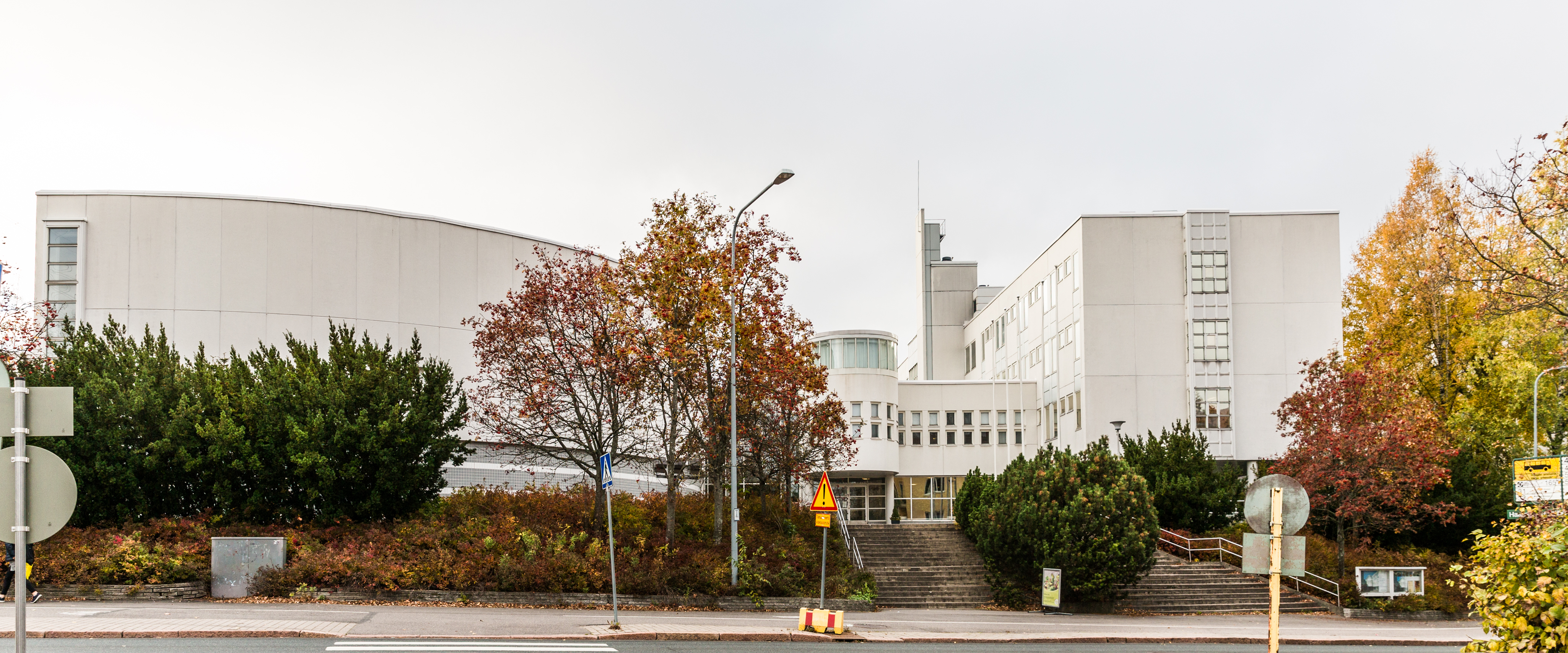 Pohjois-Haaga, Valkea talo, Kuurojen liitto